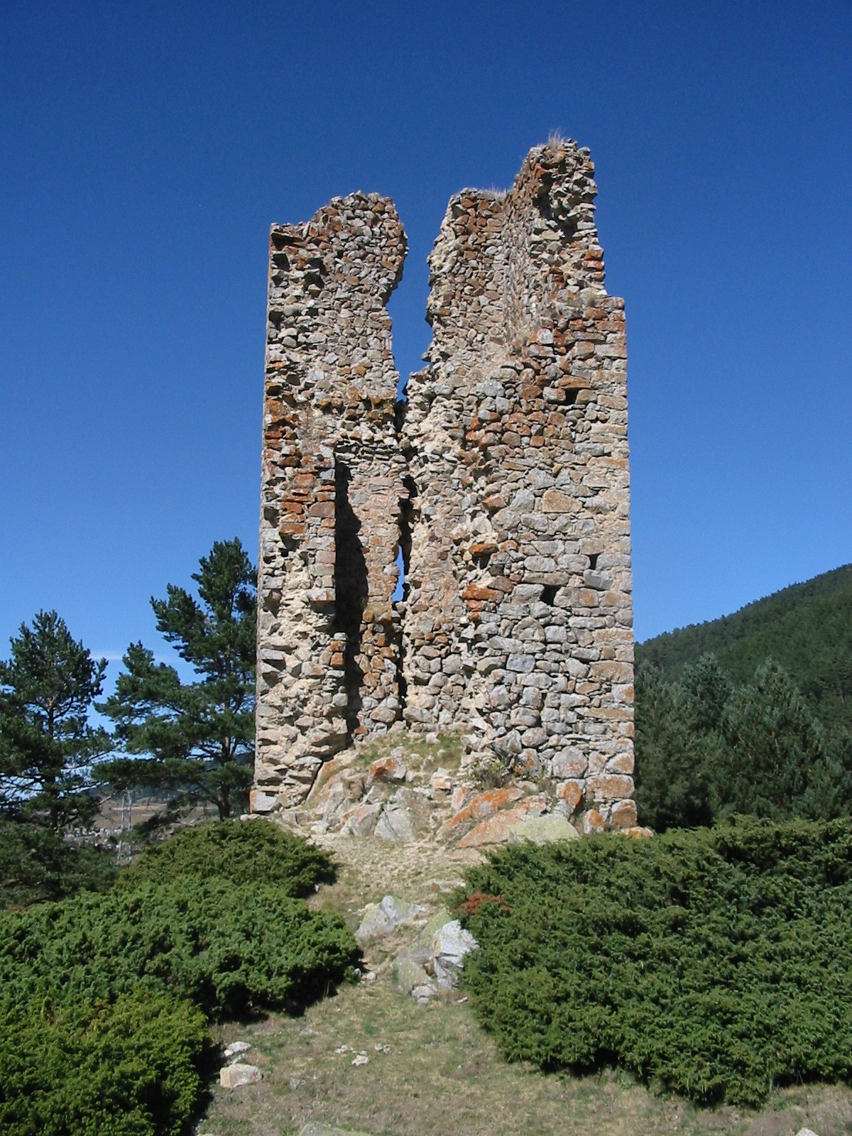 Tour de Creu, Matemale, Pyrénées-Orientales, France